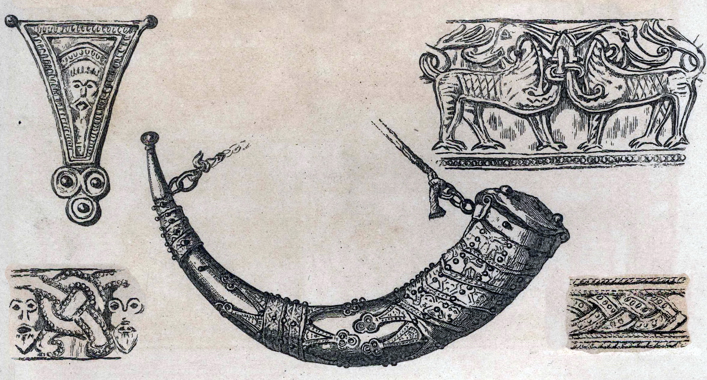 Detail van een tekening door Arnoud Schaepkens uit het Trésor de l'art ancien monuments artistiques et archéologiques par Arnaud Schaepkens. Hier: diverse objecten in de schatkamer van de Onze-Lieve-Vrouwekerk in Maastricht. Hier: de 10e-eeuwse Vikinghoorn met details. NB: enkele onderdelen van de tekening zijn verschoven t.o.v. het origineel. Collectie RHCL Maastricht, RAL P-1013-018.